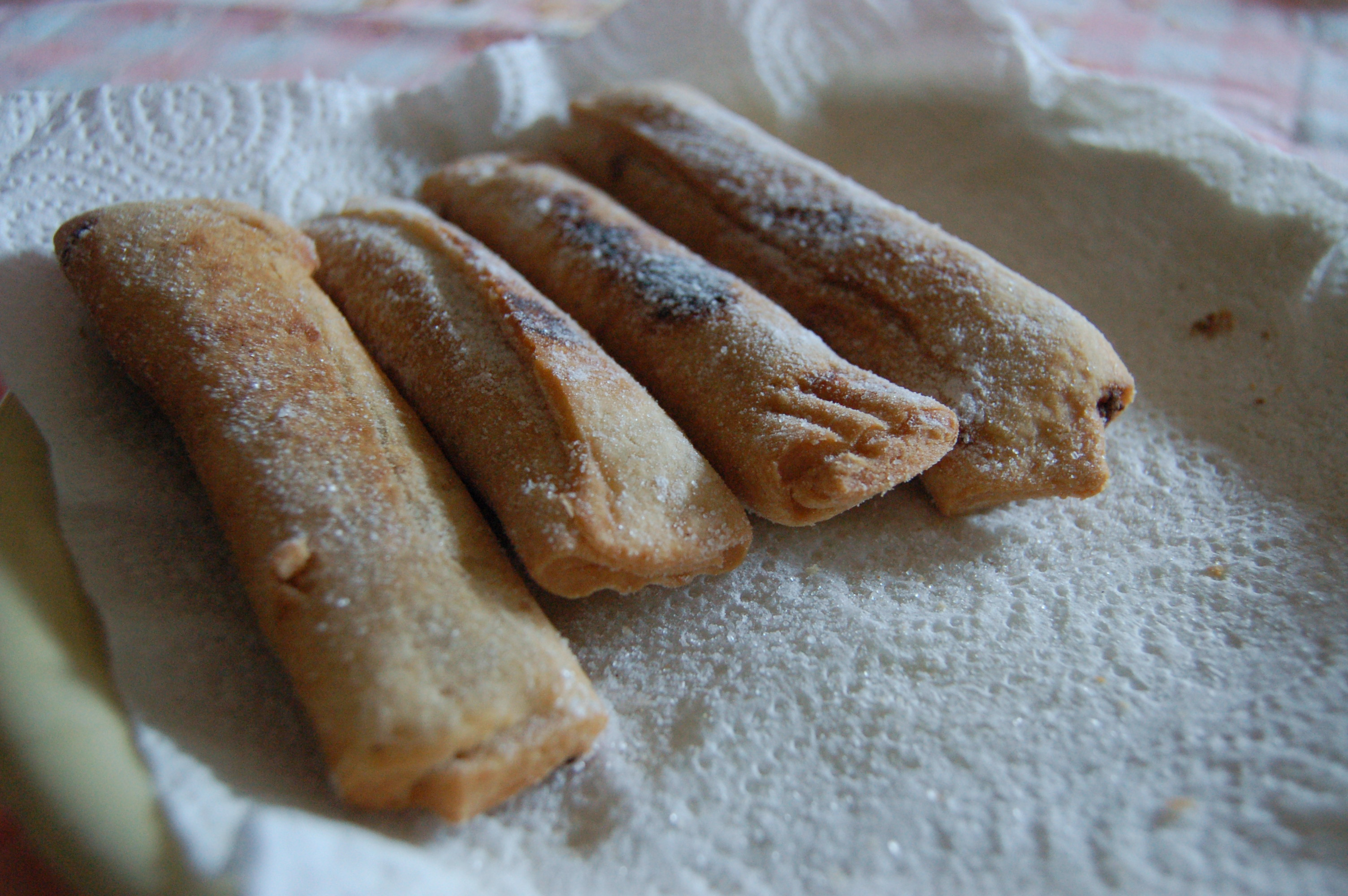 Casadielles